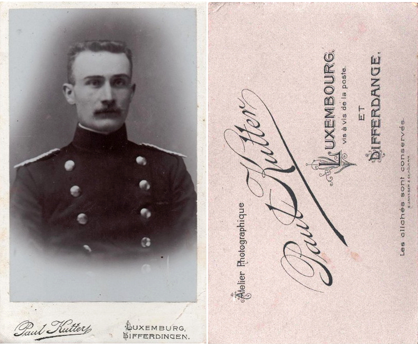 Eng sougenannte Carte de Visite (CdV) vum Fotograf Paul Kutter.